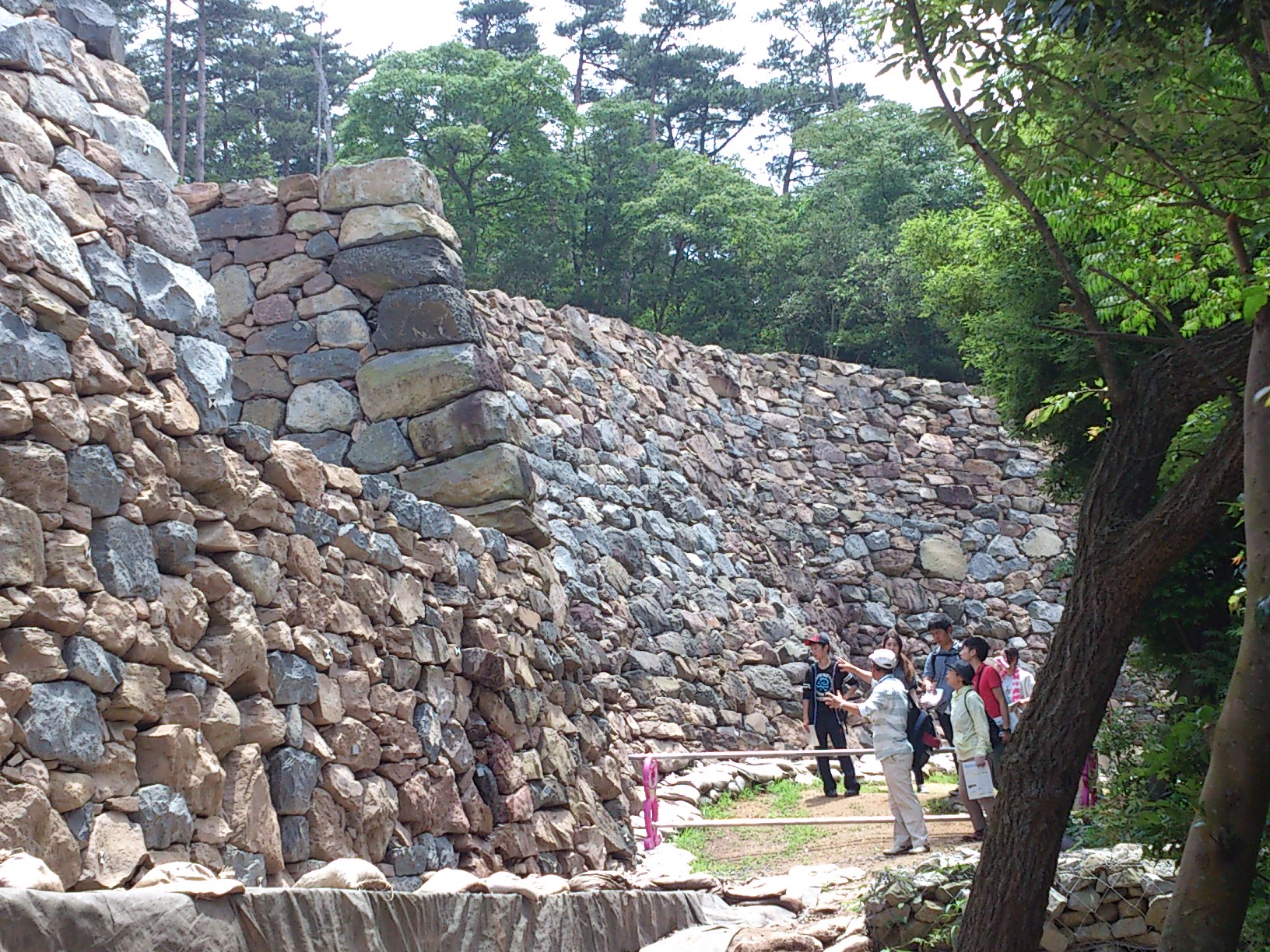 城壁北側より南を望む